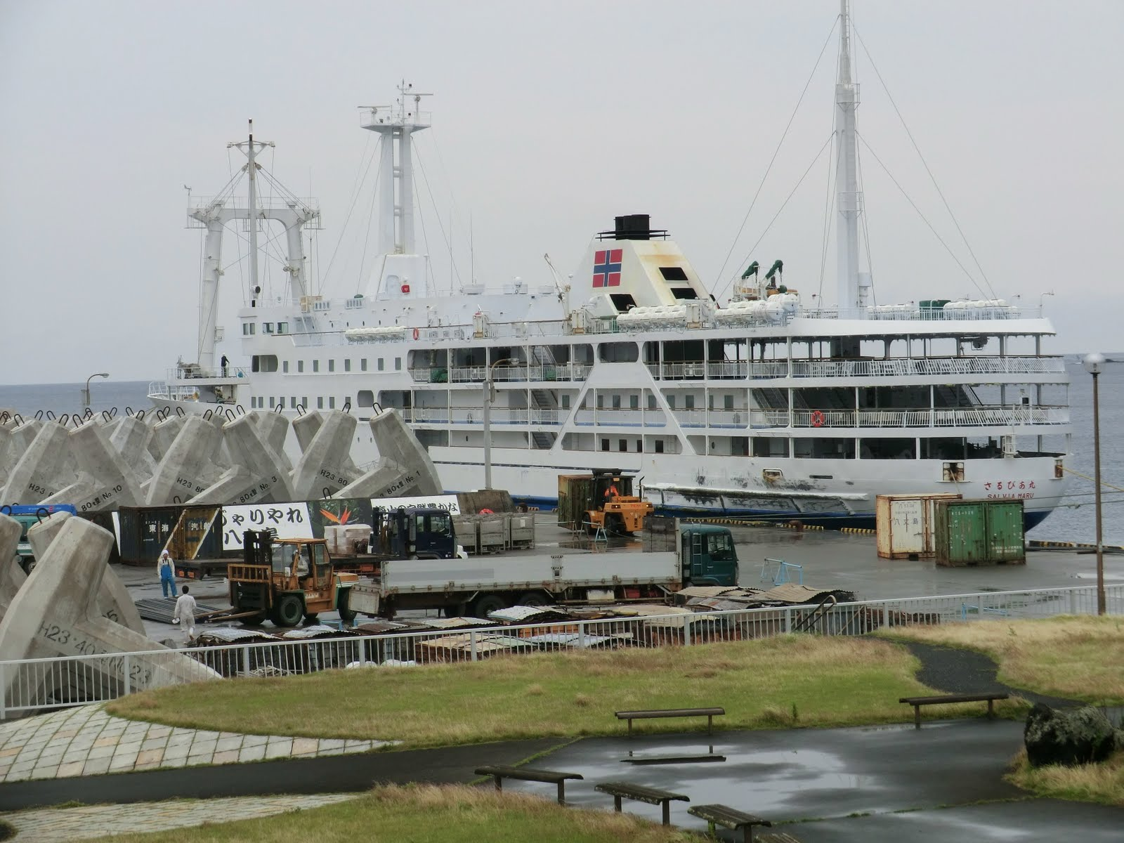 Mitsune, Hachijo, Tokyo 100-1511, Japan